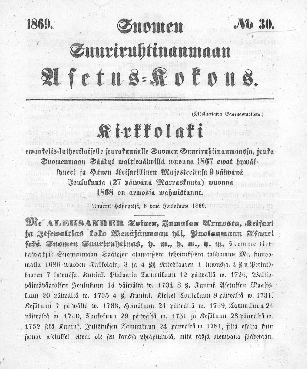 Vuoden 1869 kirkkolain ensimmäinen sivu Asetuskokoelmasta.